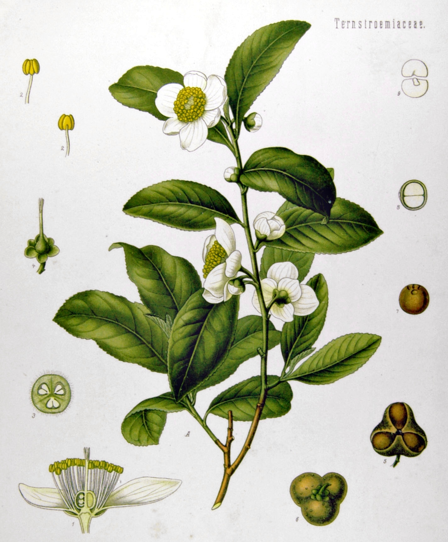 Teestrauch. A blühender Zweig, natürl. Grösse; 1 Blüthe im Längsschnitt, vergrössert; 2 Staubgefäss, desgl.; 3 Fruchtknoten im Querschnitt, desgl.; 4 Stempel mit Kelch, desgl.; 5 u. 6 reife Frucht von verschiedenen Seiten, mit Samen, natürl. Grösse; 7 Same mit Bindrücken der verkümmerten Samenknospen, desgl.; 8 derselbe zerschnitten, desgl.; 9 Embryo, desgl.